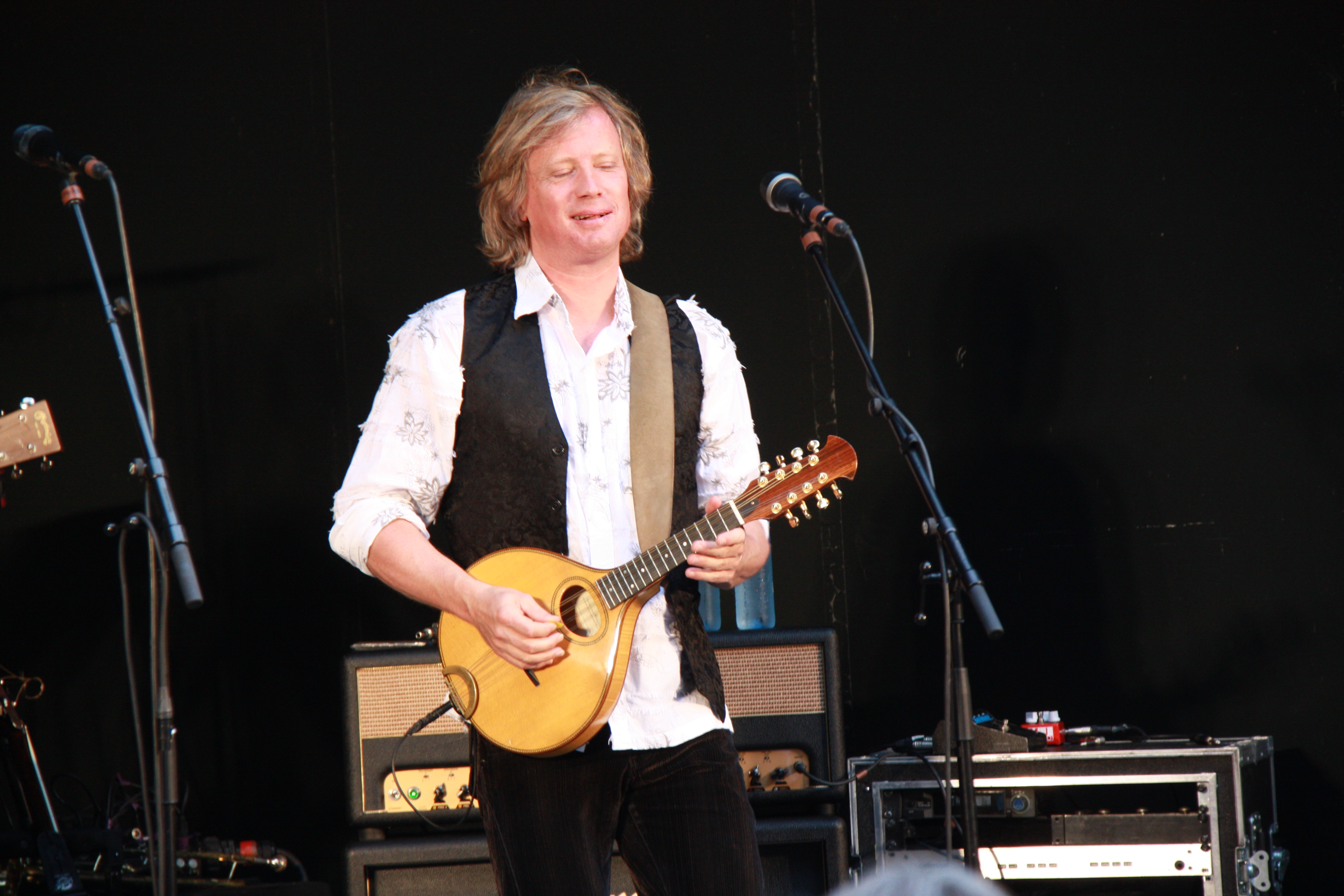 Torbjørn Økland i Vamp under en konsert i Søgne i 2011